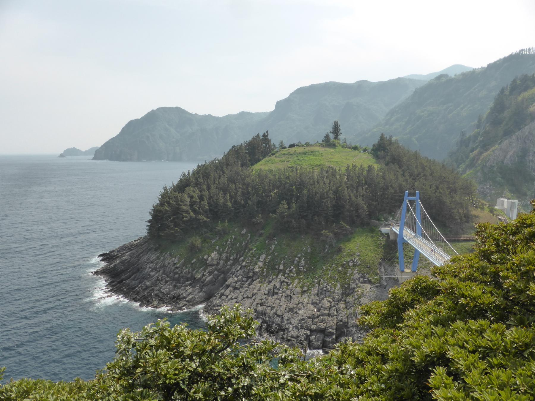 韓国鬱陵島の放射状節理